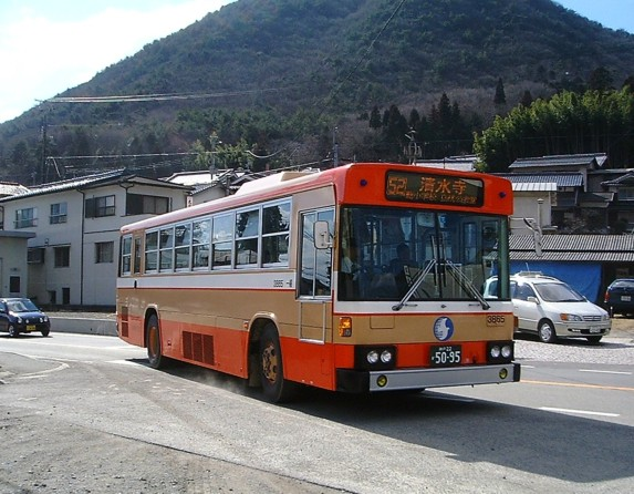 公会堂前バス停に停車中の清水寺行き神姫バス